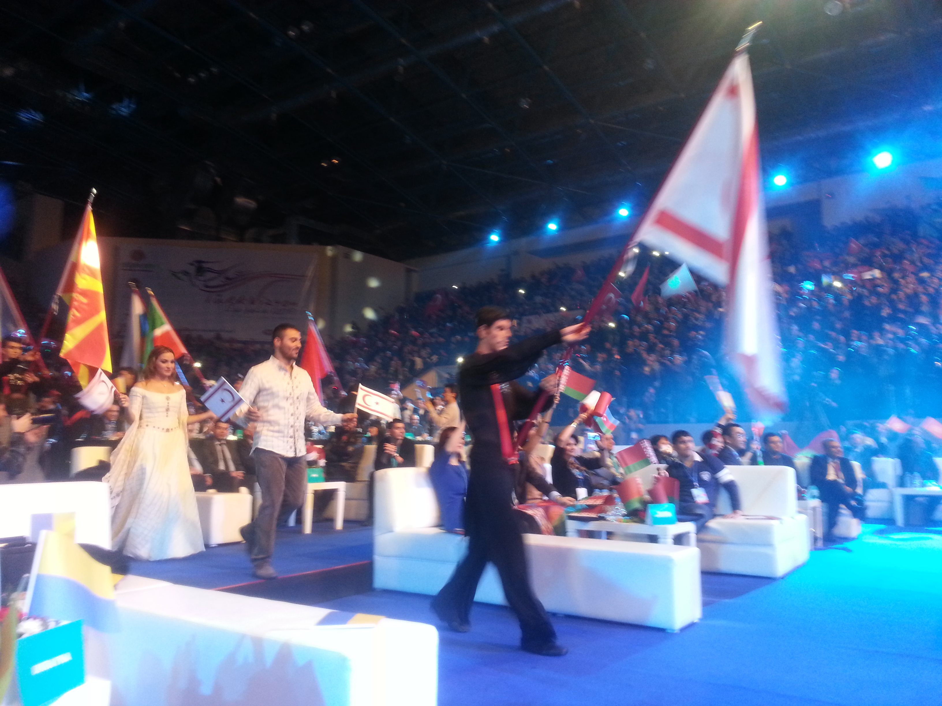 Türkvizyonda Kıbrıs ve Gommalar.